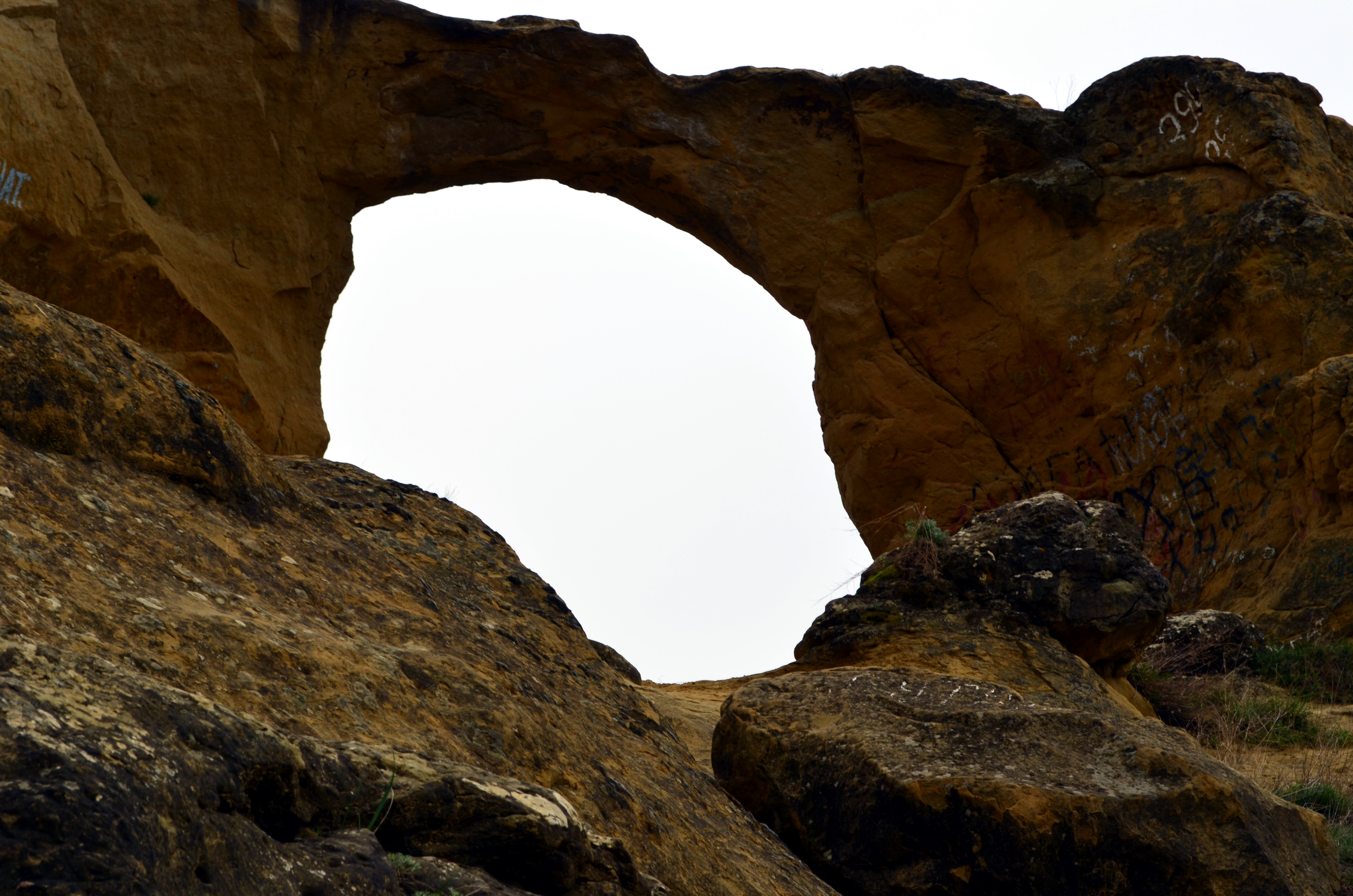 Гора Кольцо: Северная окраина г. Кисловодска, отрог южного склона хр. Боргустан, Кисловодск, Ставропольский край This image is related to the protected area of Russia number 2610067